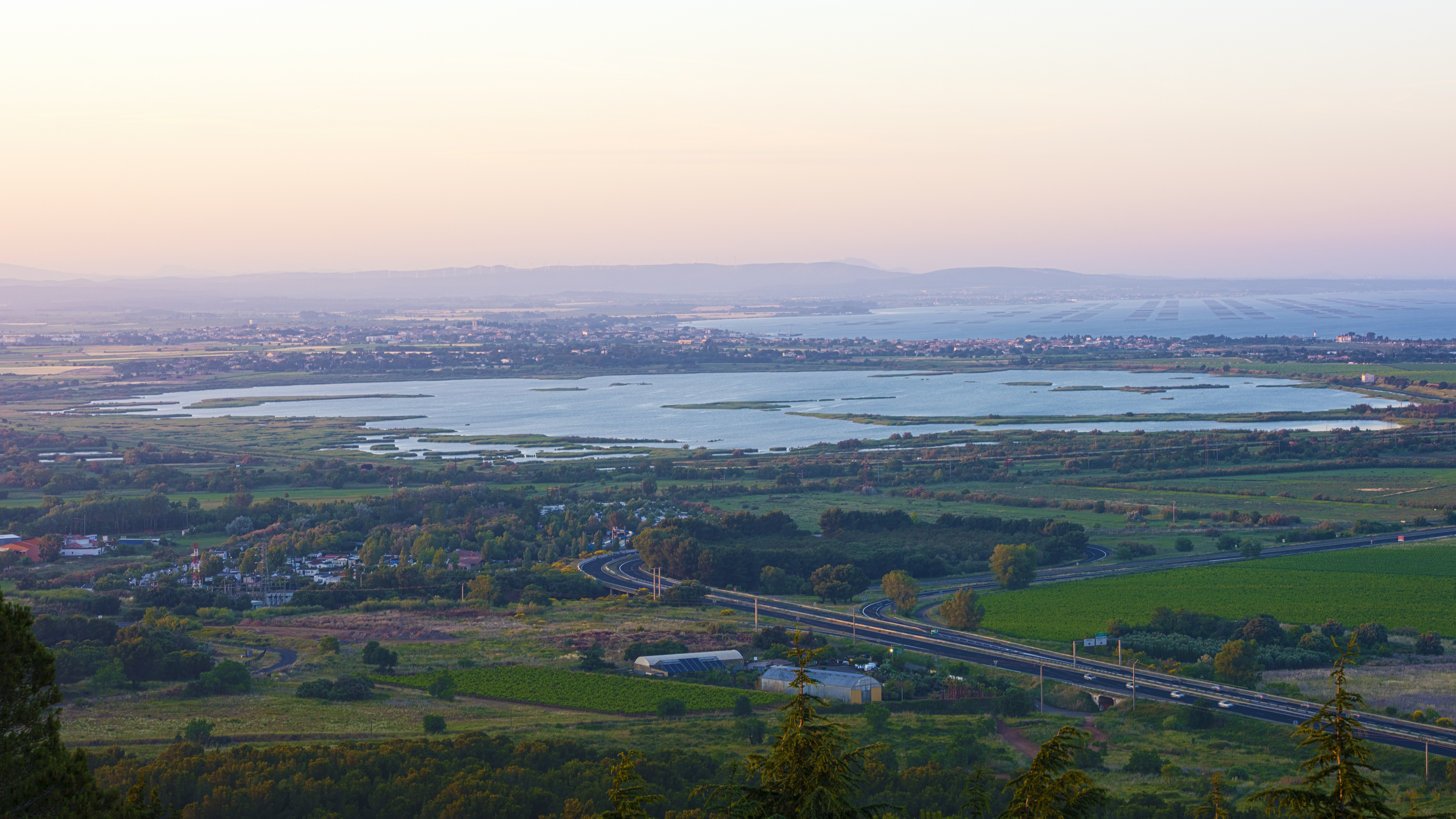 L'Étang du Bagnas et le village de Marseillan au bord de L'étang de Thau (au fond à droite). Réserve naturelle du Bagnas. Hérault, France.